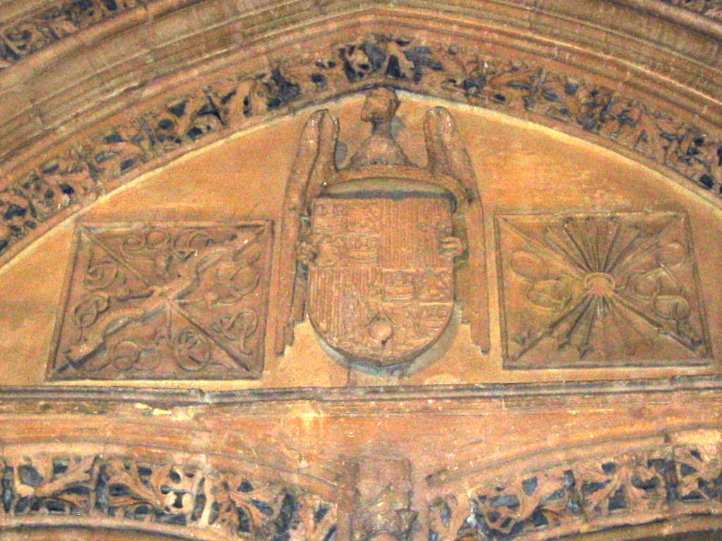 Escudo de los Reyes Católicos en la Iglesia de Santiago Apostol de Orihuela, monumento nacional.